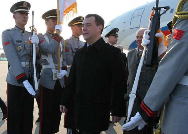 Прибытие в Сеул.